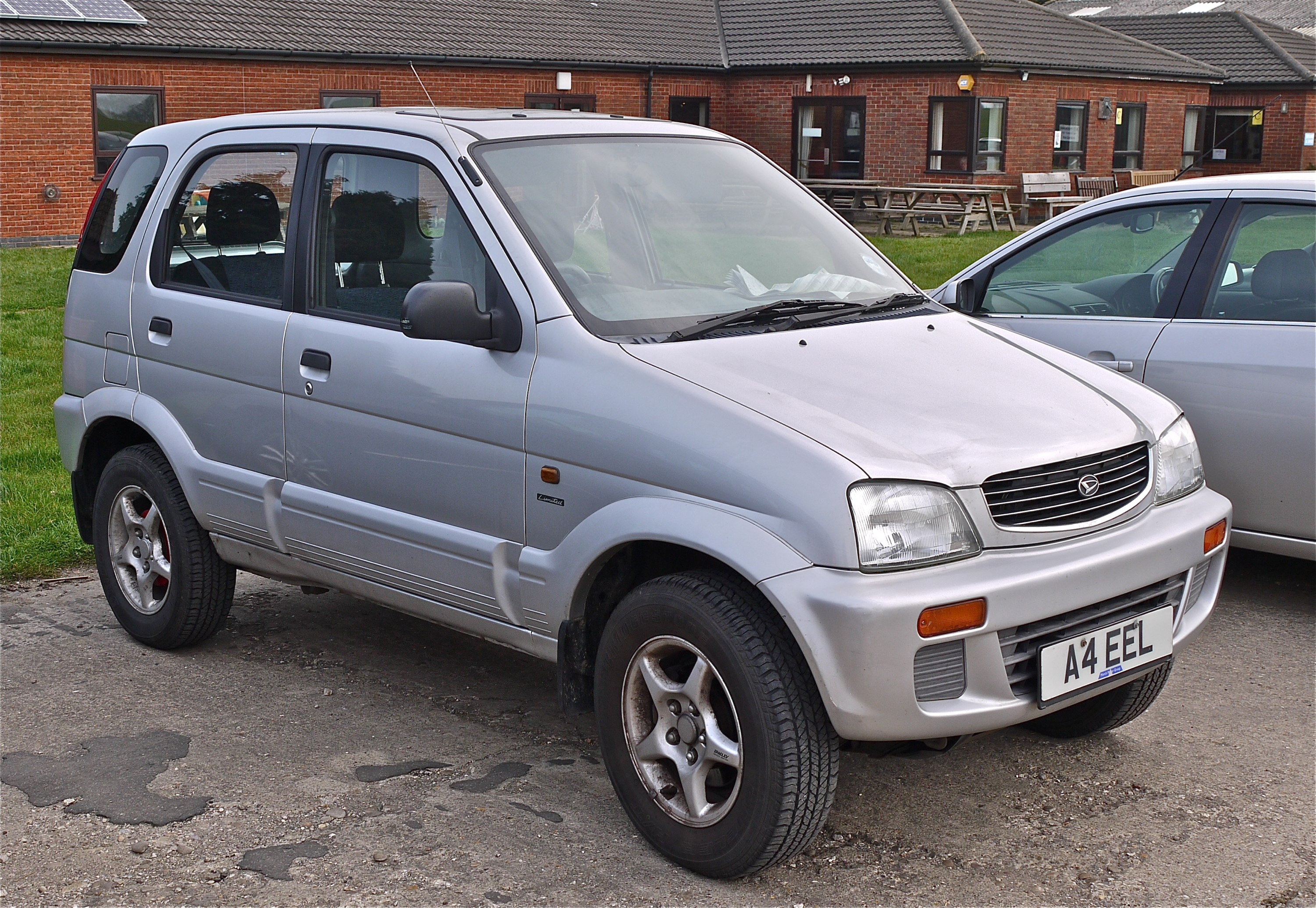 Panasonic G1 14-45 Lns